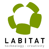 Logo for labitat - en sammentrækning af LABoratorie og habITAT - visualiseret som noget der både minder om et atom eller et habitat.